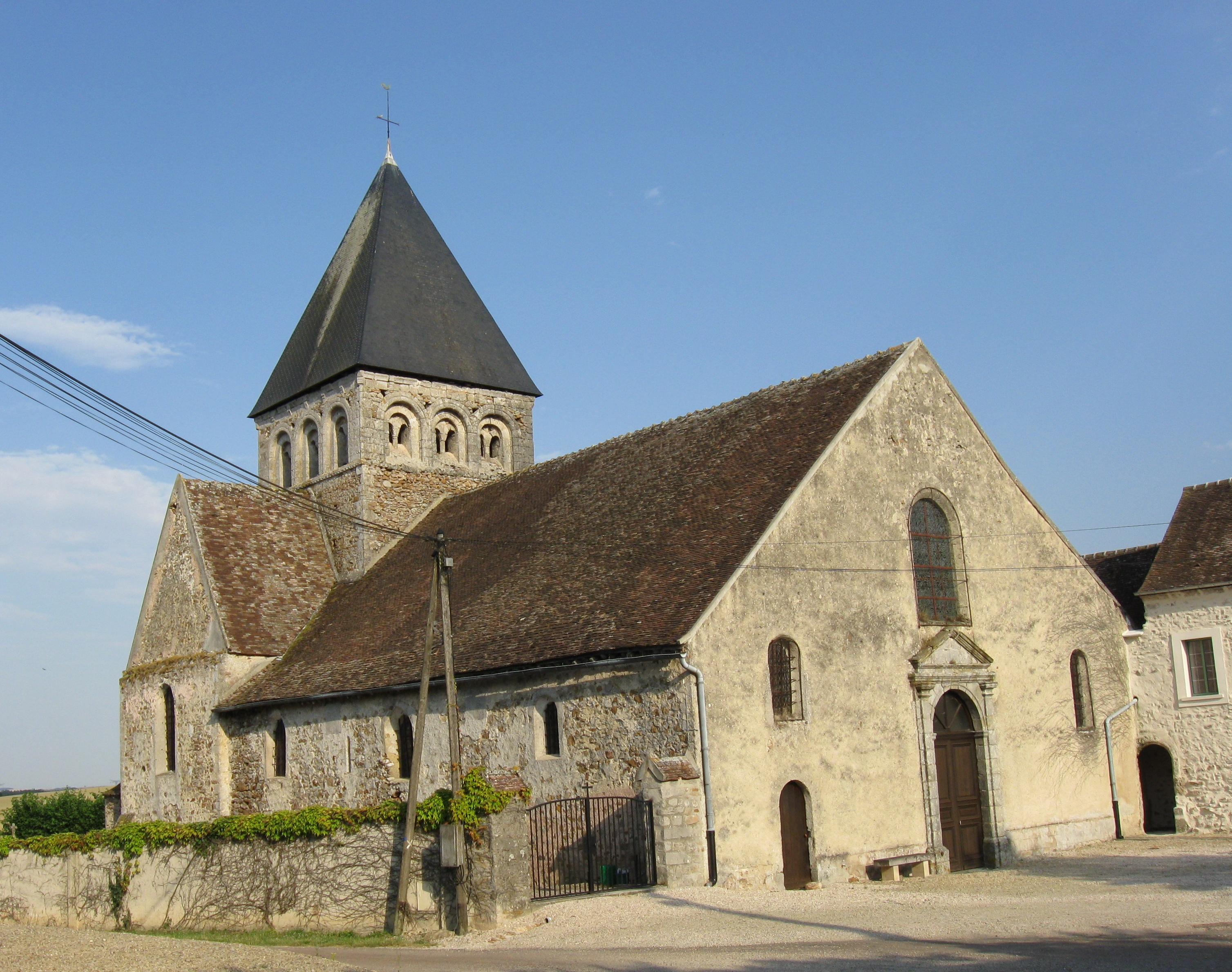 Église Saint-Nicolas à Saint-Nicolas-la-Chapelle. (Aube, région Champagne-Ardenne).